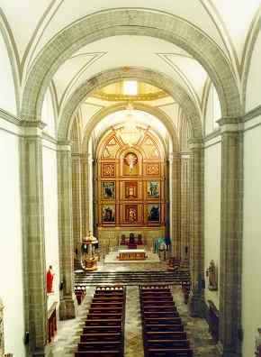 Interior de la Catedral de Cuautitlán, vista desde el coro